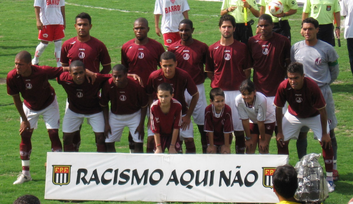 Equipe do Juventus na Copa FPF